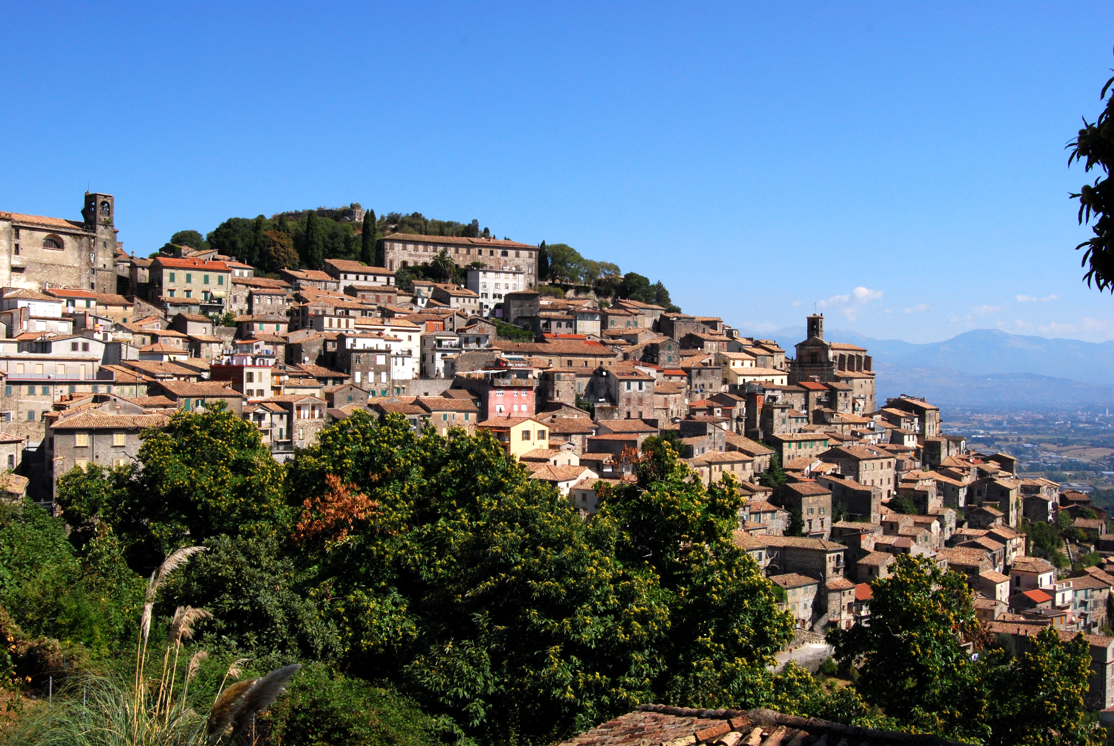 Panorama di Patrica (Frosinone, Lazio, Italia)